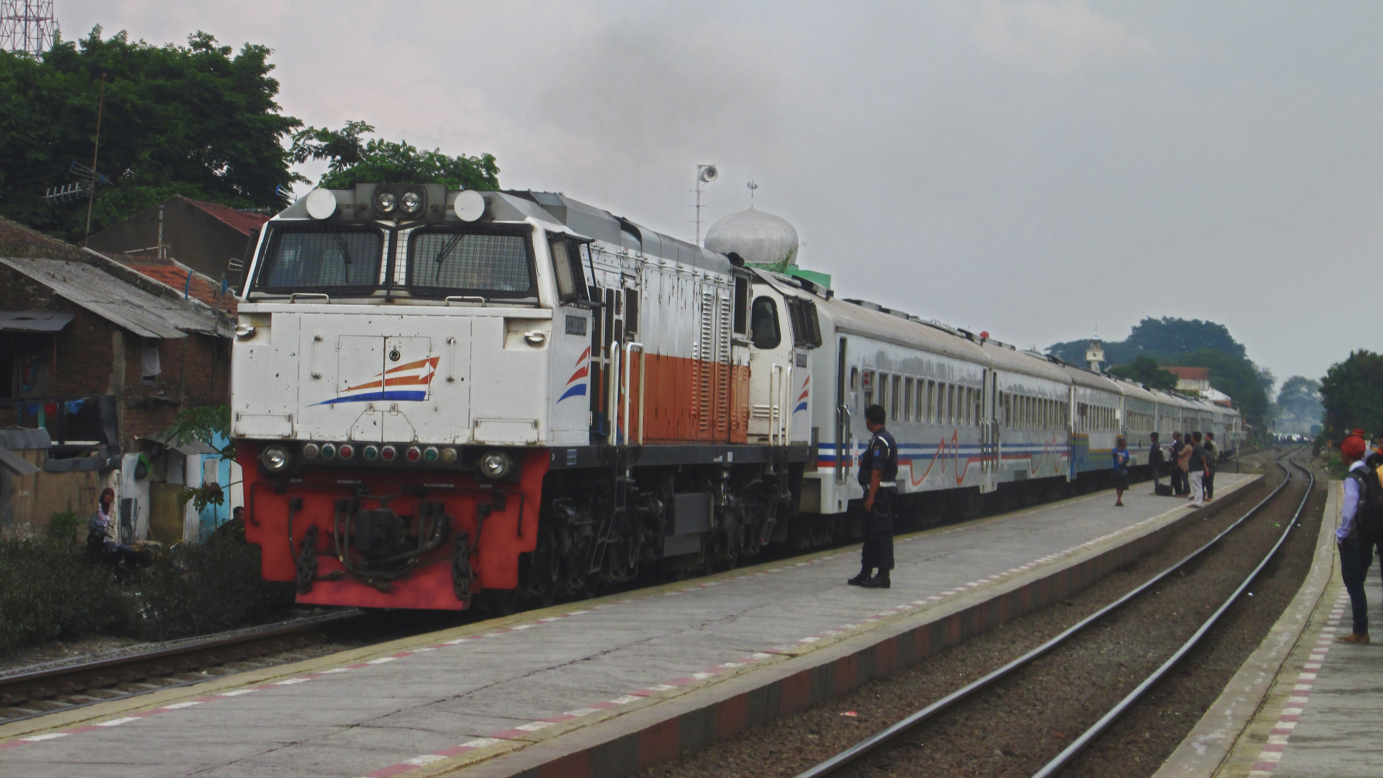 Suasana peron ketika KA Lodaya berjalan langsung Stasiun Cikudapateuh